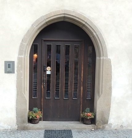 VP